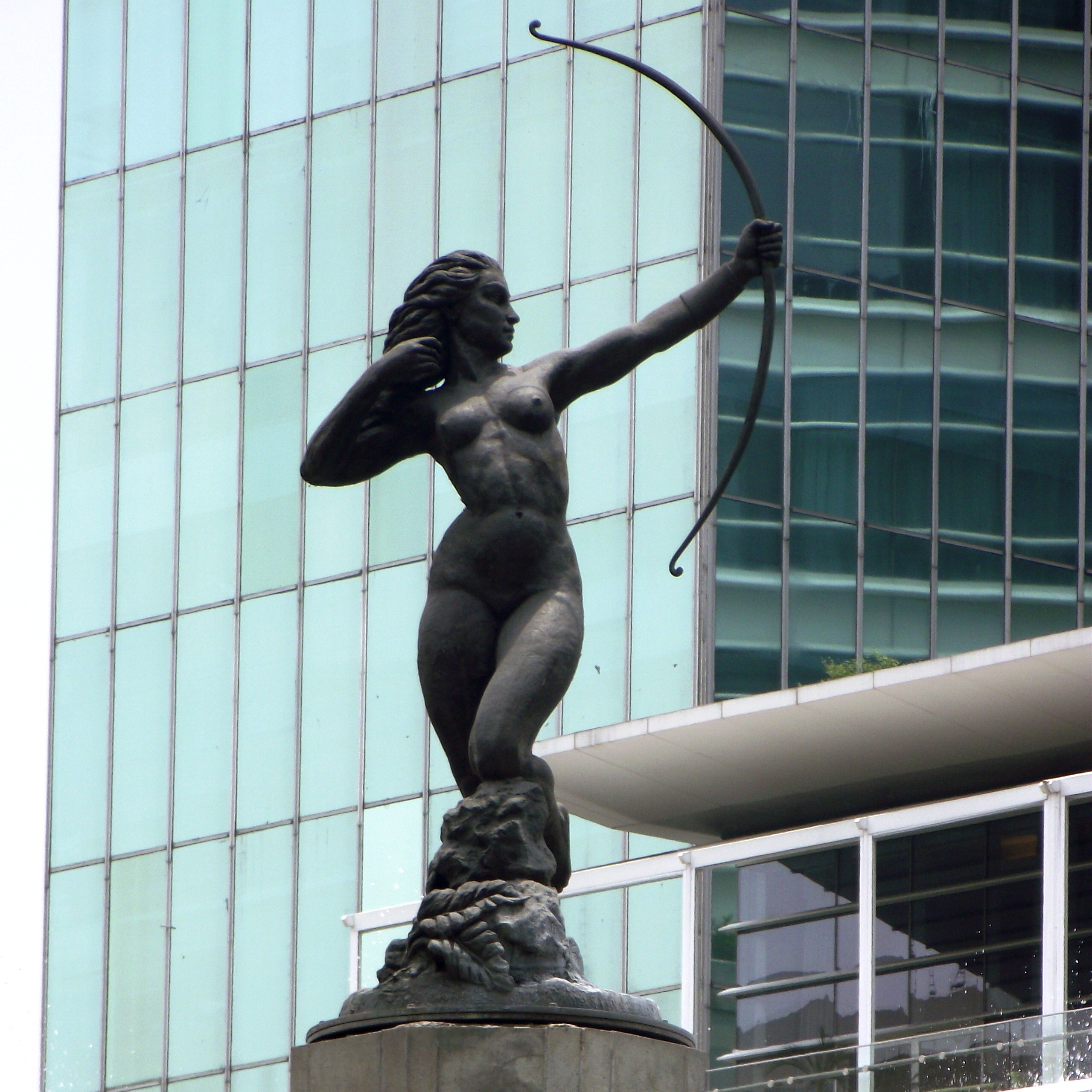 Fuente de la Diana Cazadora in Mexico City